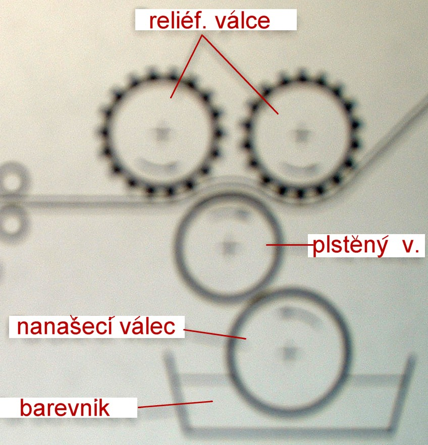 Schema: Vigoureuxdruck